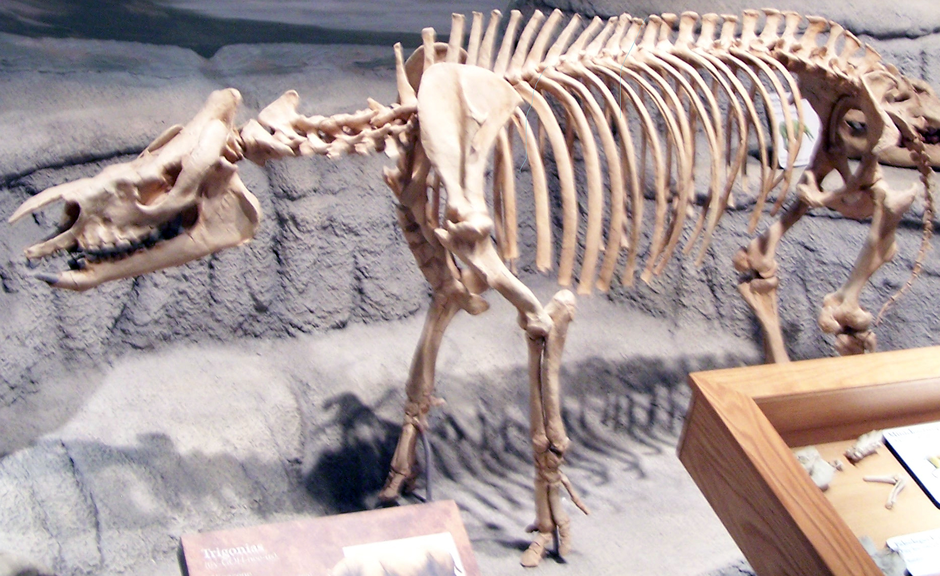 Trigonias skeleton, Denver museum.